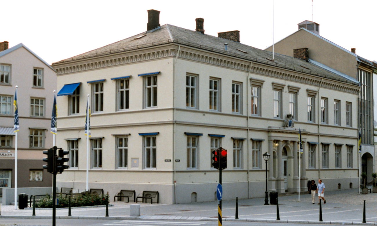 Halden rådhus. Oppført én etasje i klassisistisk stil i 1819 for Carl Adolph Dahl. Uskadd i bybrannen i 1826 og solgt til kong Karl Johan. Påbygd til to etasjer i 1850-åra av Truls Wiel, ombygd i nyrenessansestil til rådhus i 1902 ved arkitekt Halfdan Berle.